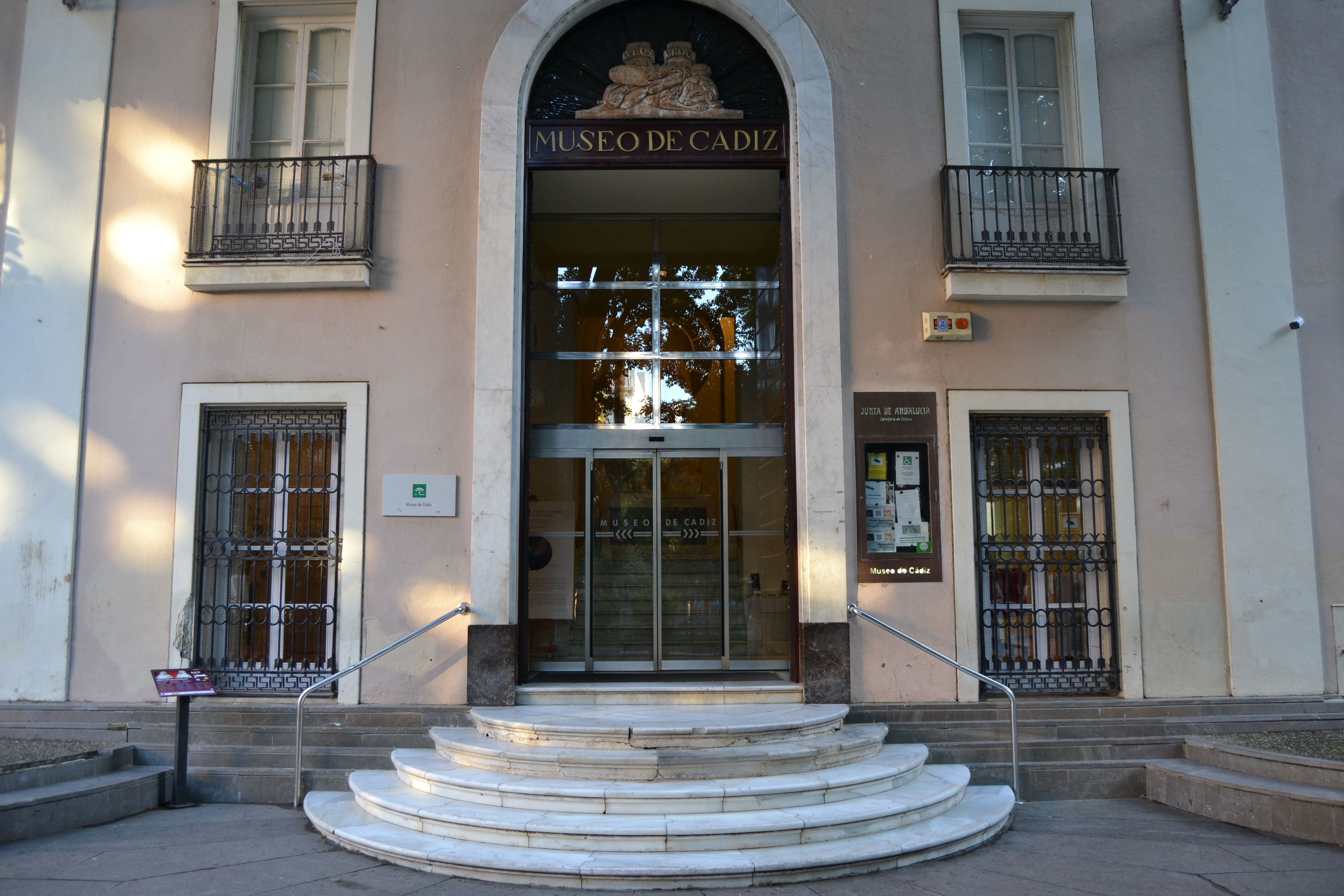 Cádiz, Andalucía, España. Diciembre de 2016.